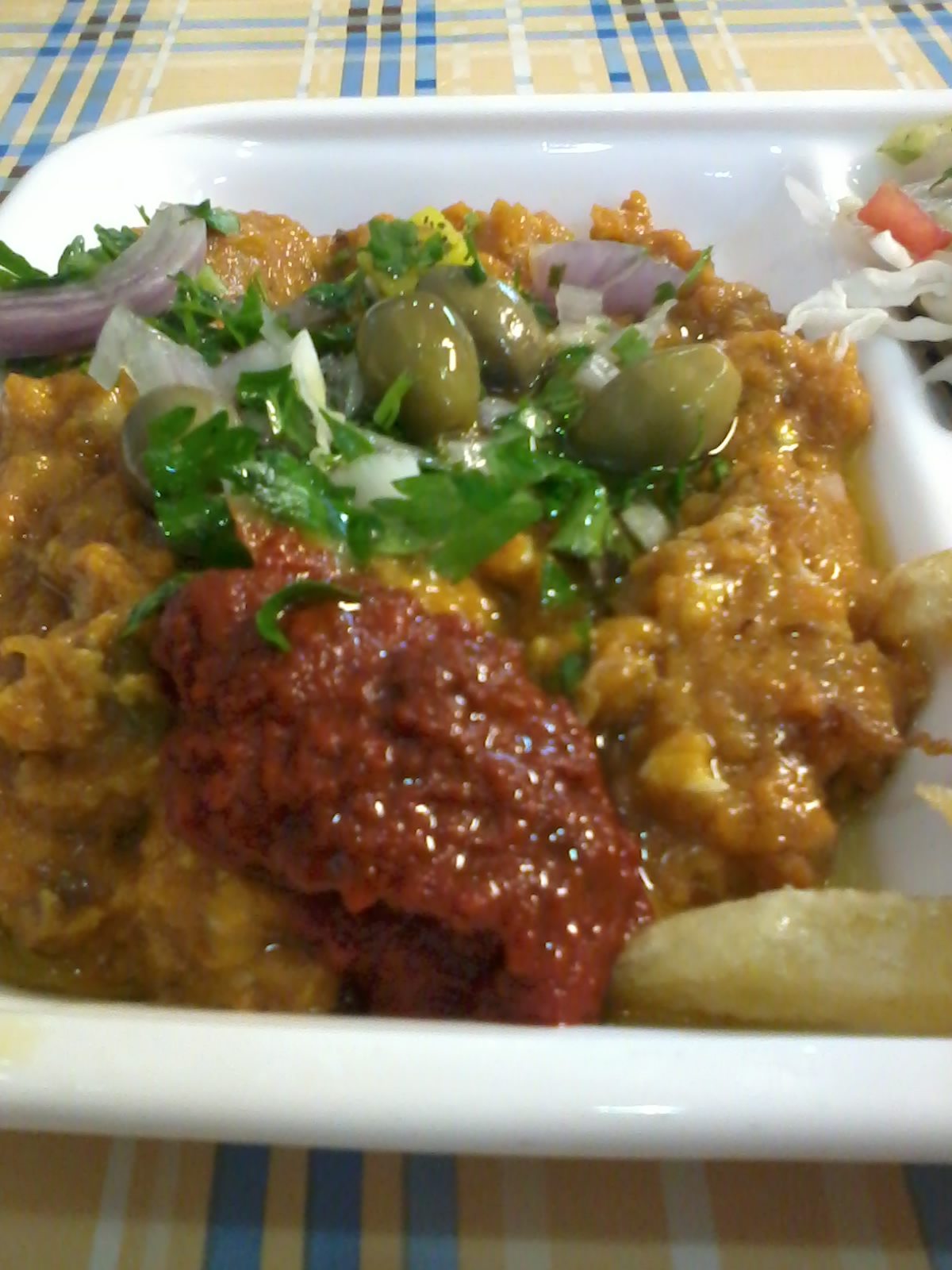 Plats de la cuisine Tunisienne This is an image of food from Tunisia